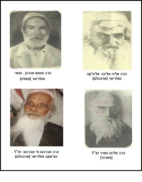 מרבני קהילת יהודי קוצ'ין בתחילת המאה ה-20